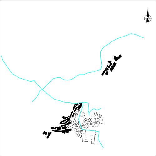 San Giovanni in Fiore - sviluppo centro storico Fase III